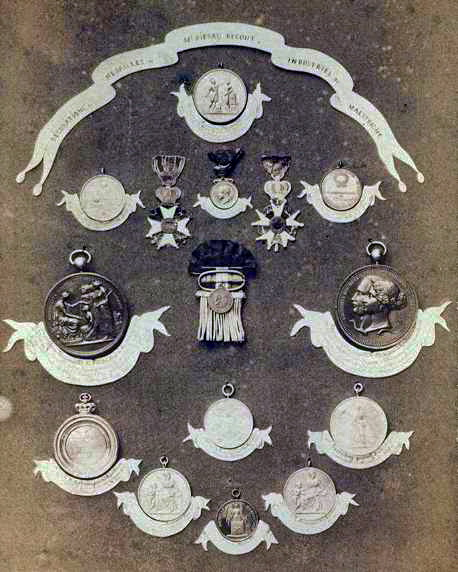 Persoonlijke onderscheidingen van Petrus I Regout (Décorations & médailles de Mr. Pierre Regout Père) voor zijn werk als ondernemer en katholiek weldoener. De foto bevindt zich in het Album de la famille de Mr. Pierre Regout à Maestricht, vervaardigd omstreeks 1869 door Billon, rue des Recollets, 13, Parijs ("Photographe, Neveu et Élève de Mr. Daguerre"). Het bevat foto’s van diverse leden van de familie Regout en van de prenten uit het Album dédie à mes enfants et mes amis. Fotocollectie RHCL Maastricht, RAL P-0656-069.